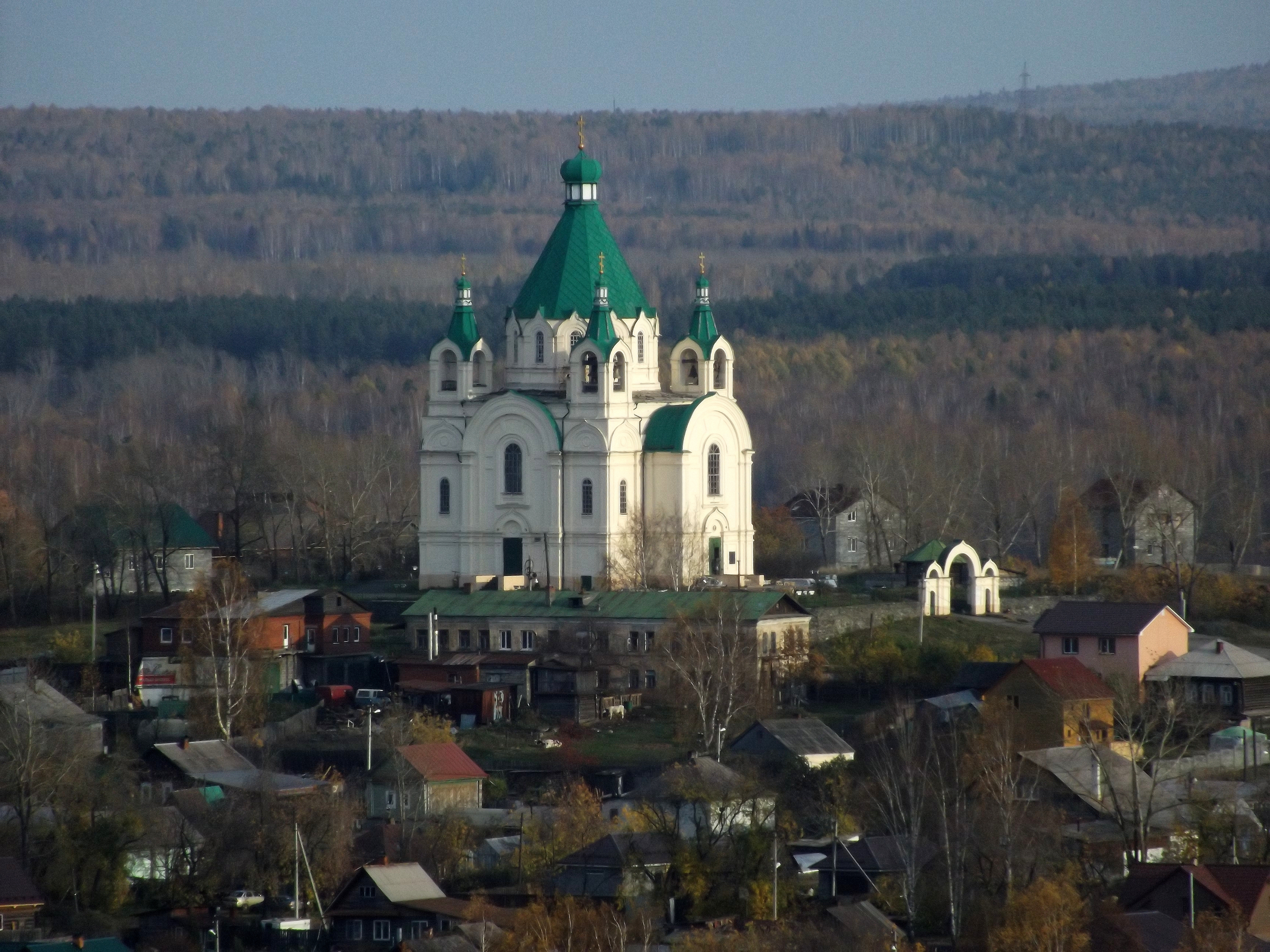 Церковь Александра Невского: улица Совхозная, 5, Нижний Тагил, Свердловская область